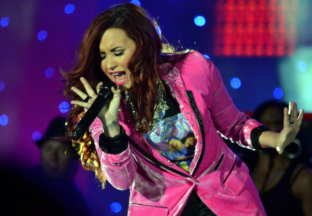 Demi Lovato de Festival Verano Iquique, de febrero 2012.